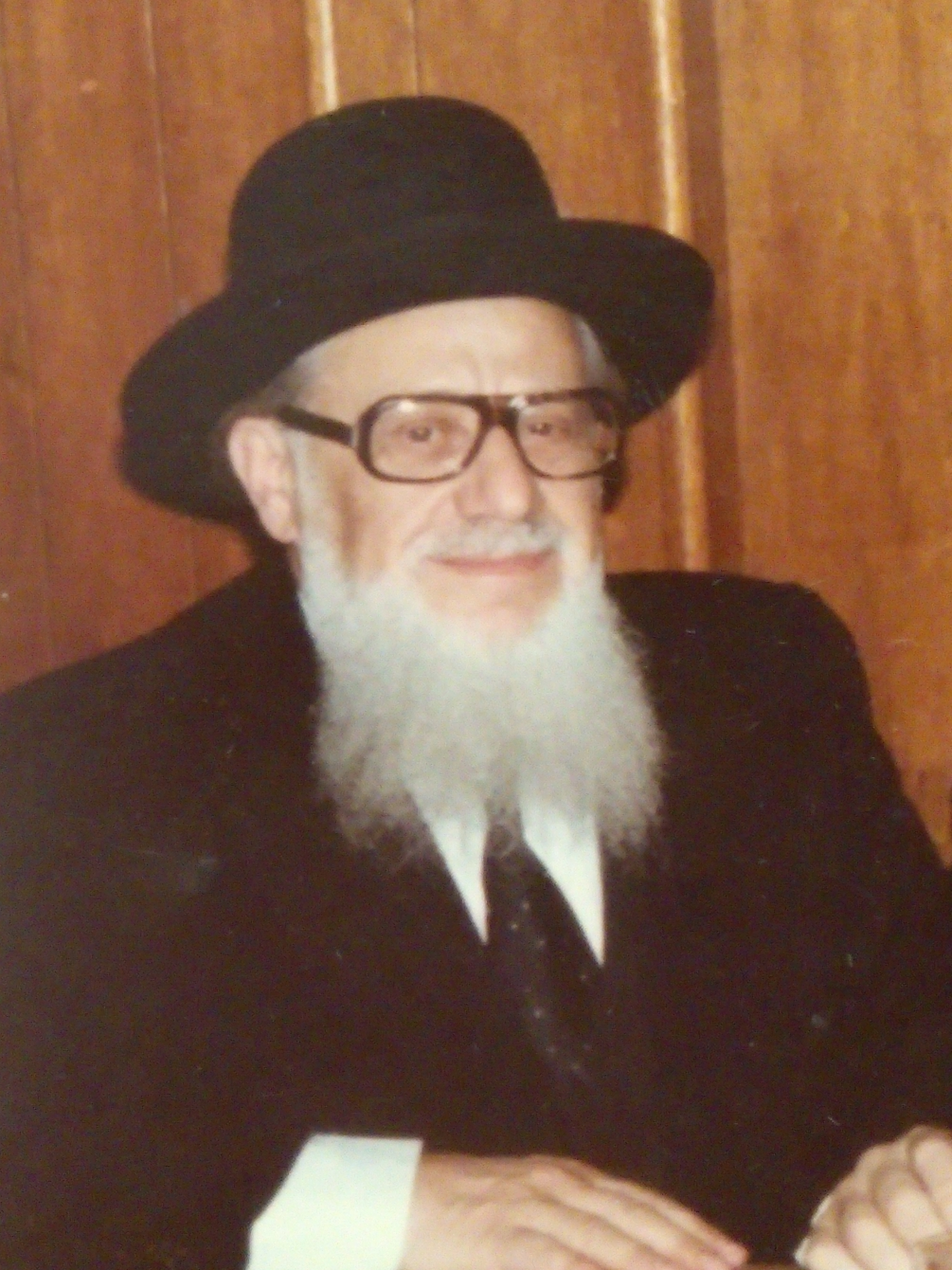 רבי ברוך לייזרובסקי